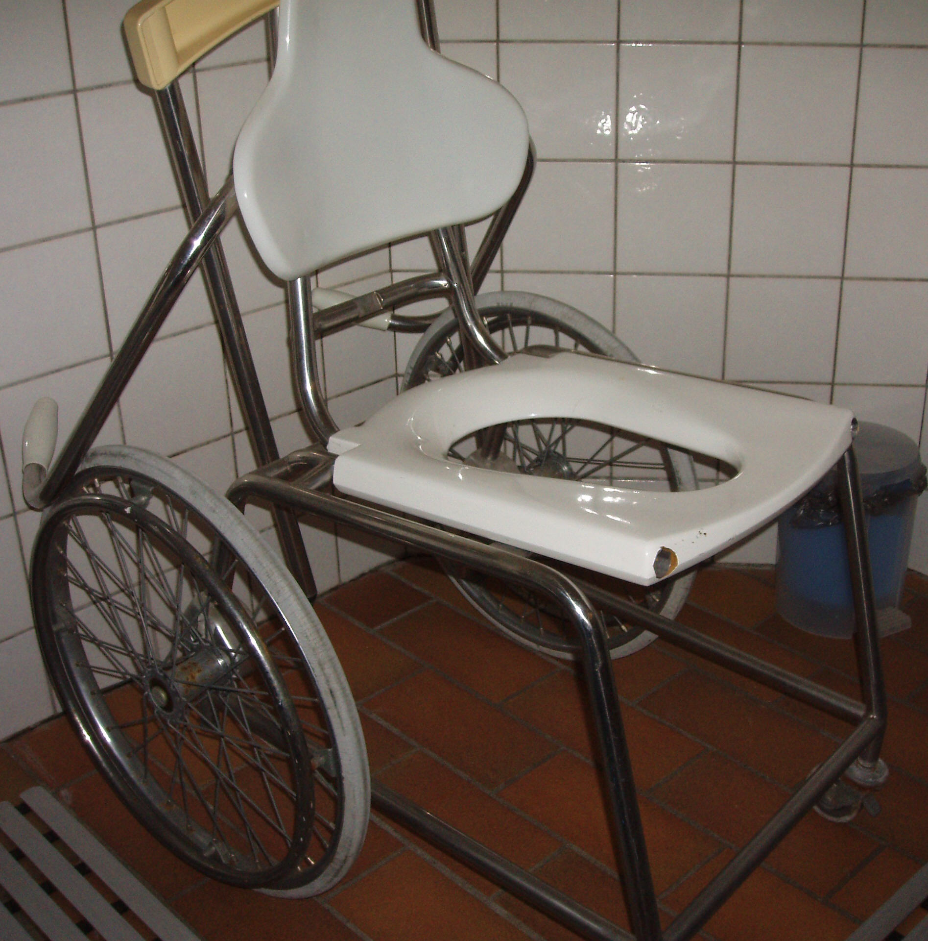 Antiker Duschrollstuhl im Freibad Bruchhausen-Vilsen